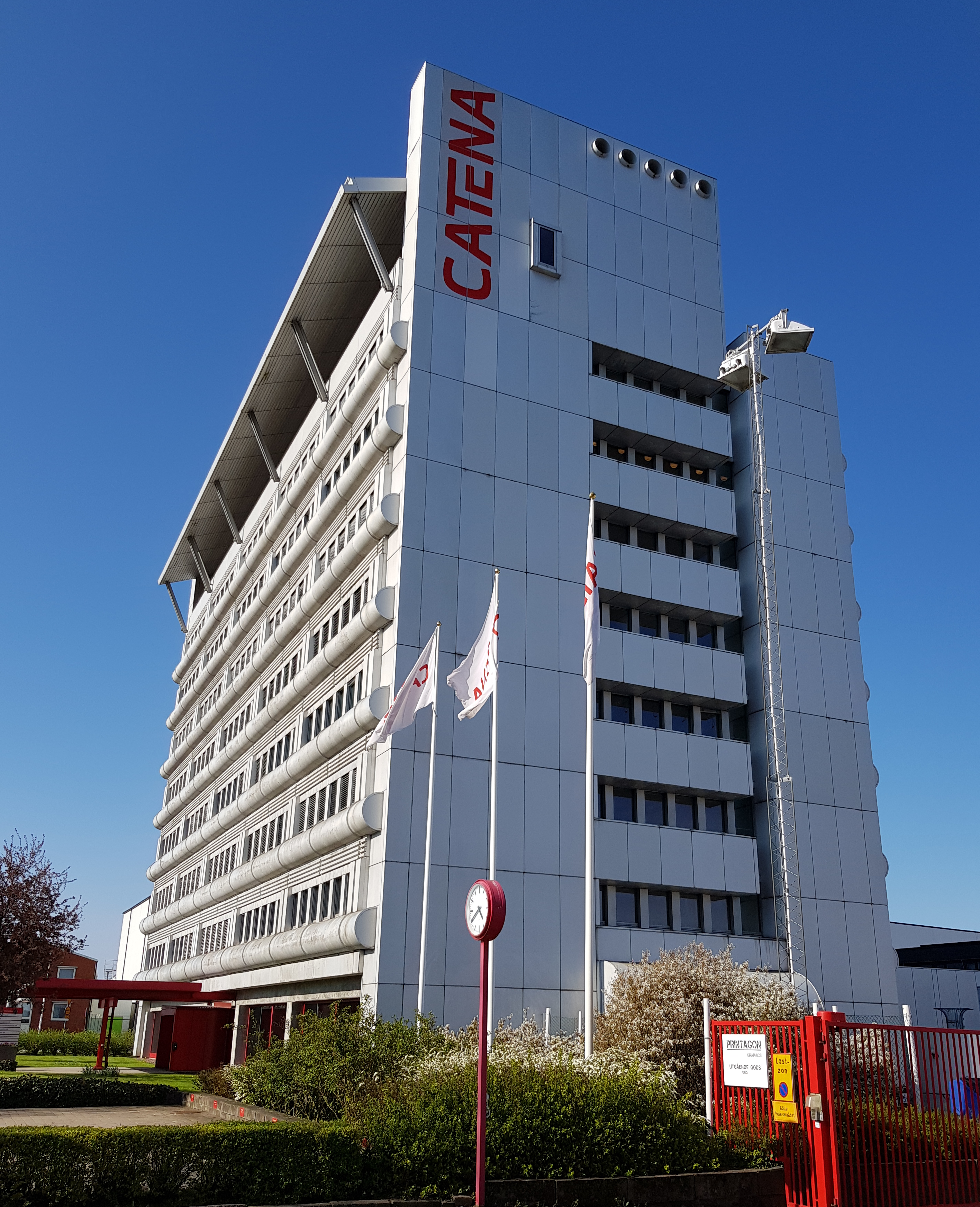 Allerhuset (eller Allershuset) i Helsingborg. Sedan 2017 har Catena verksamhet i denna byggnad.